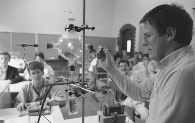 Juni 1988 Bonn: Gymnasium - Chemie Unterricht.